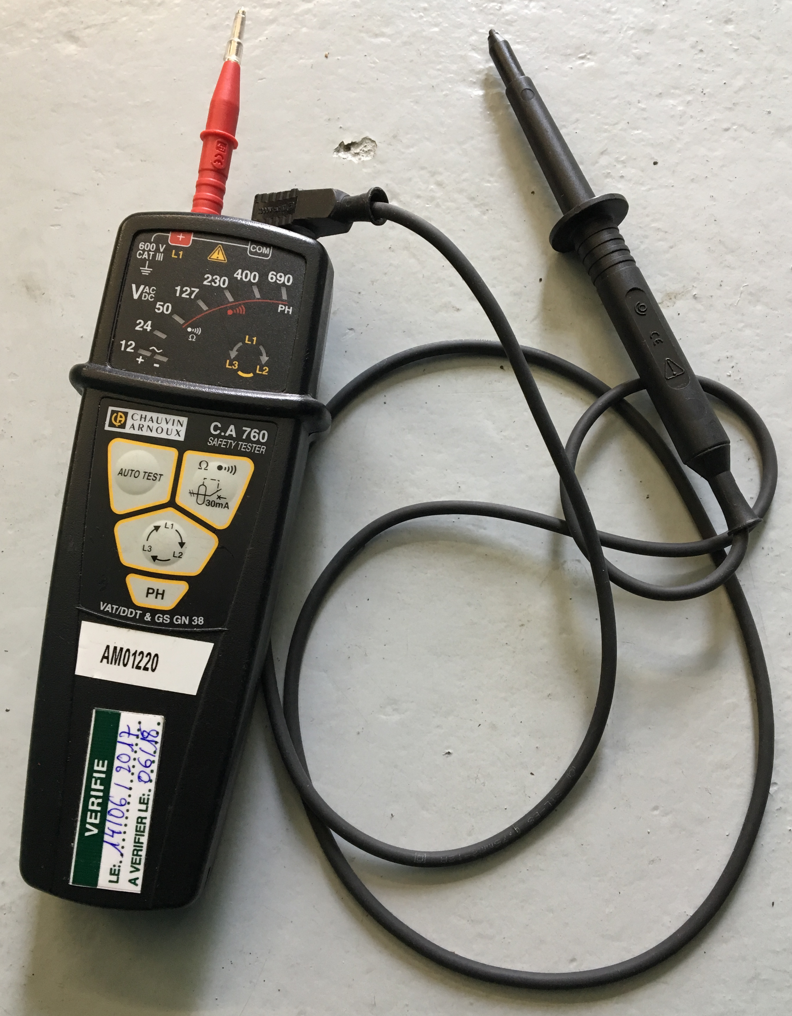 Vérificateur d'absence de tension (basse tension)